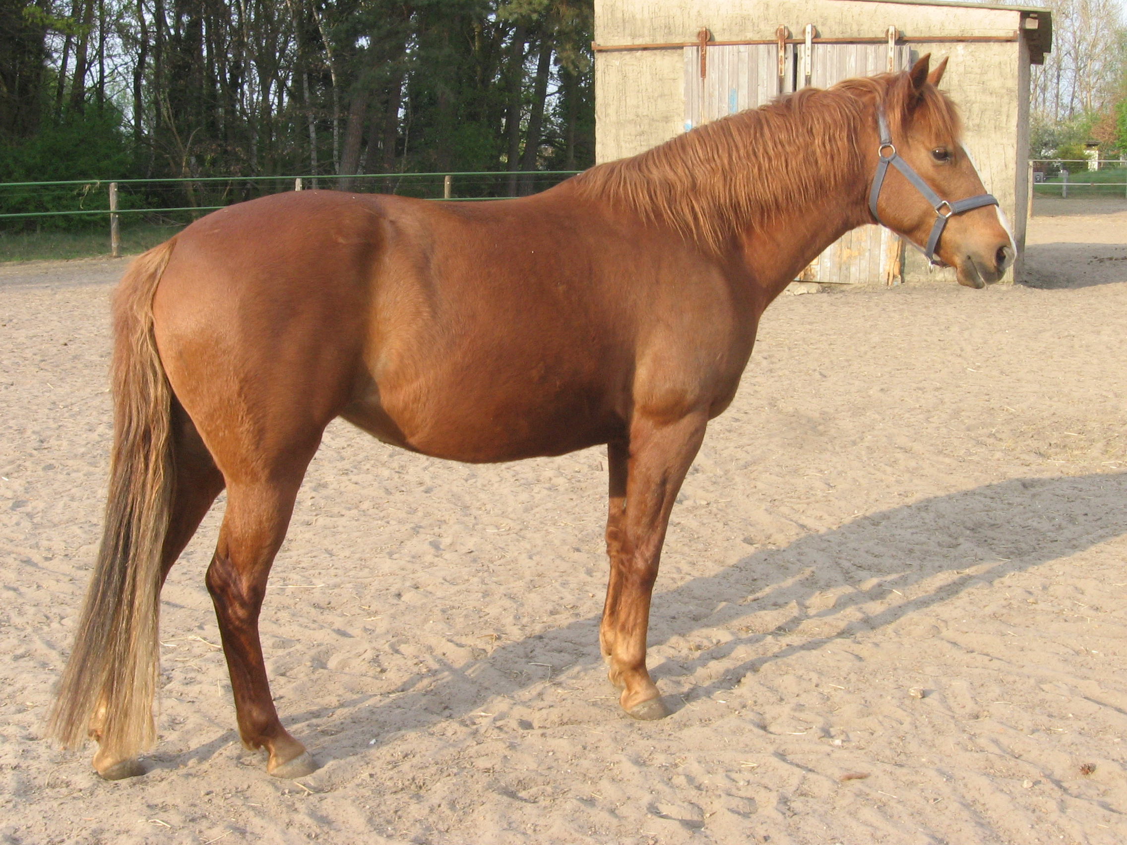 Berberstute Zafira Al Saïda